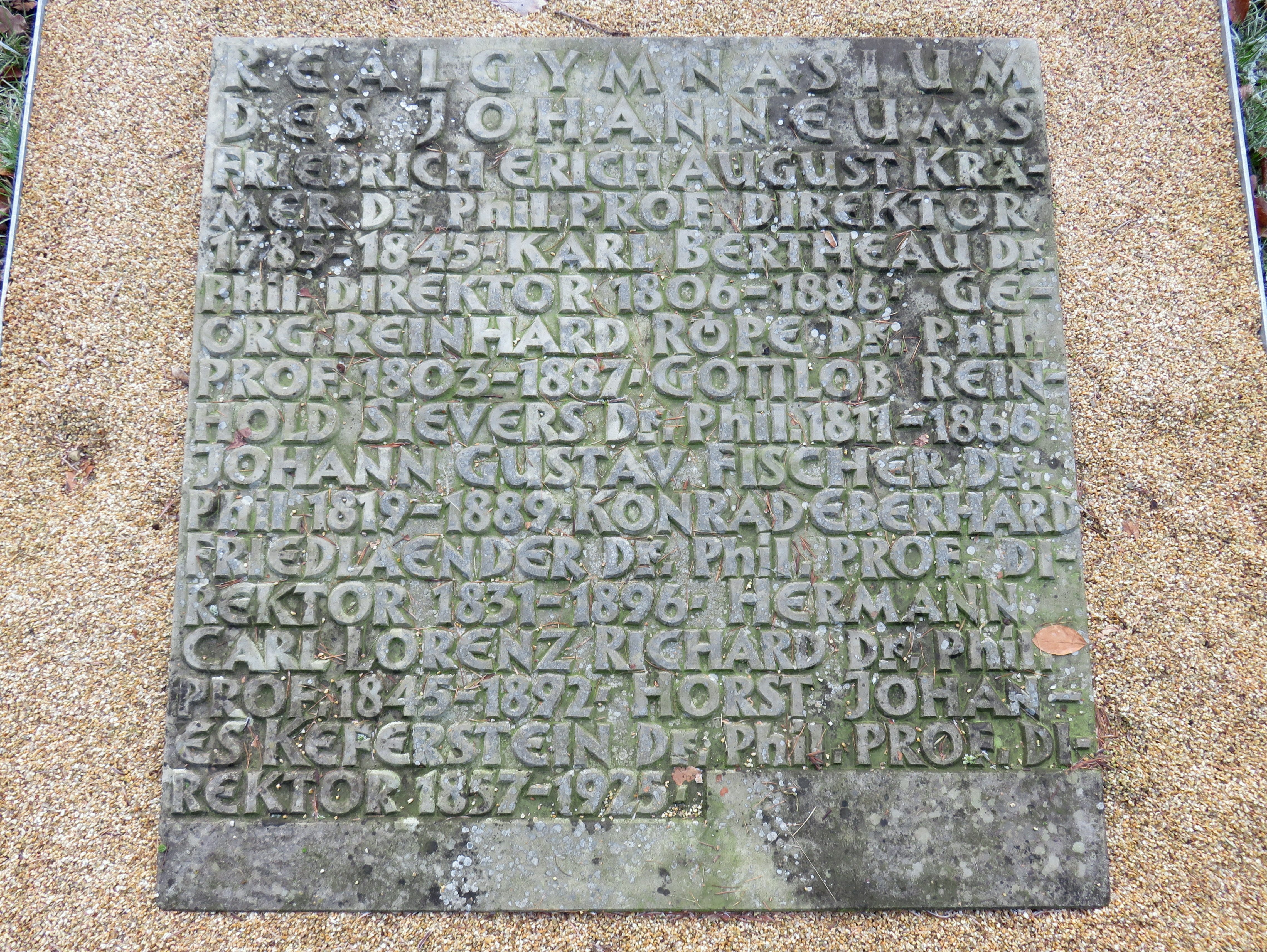 Sammelgrab Realgymnasium des Johanneums im Bereich des Althamburgischen Gedächtnisfriedhofs auf dem Hamburger Friedhof Ohlsdorf zu Ehren von unter anderem Carl Bertheau der Ältere, Gottlob Reinhold Sievers.